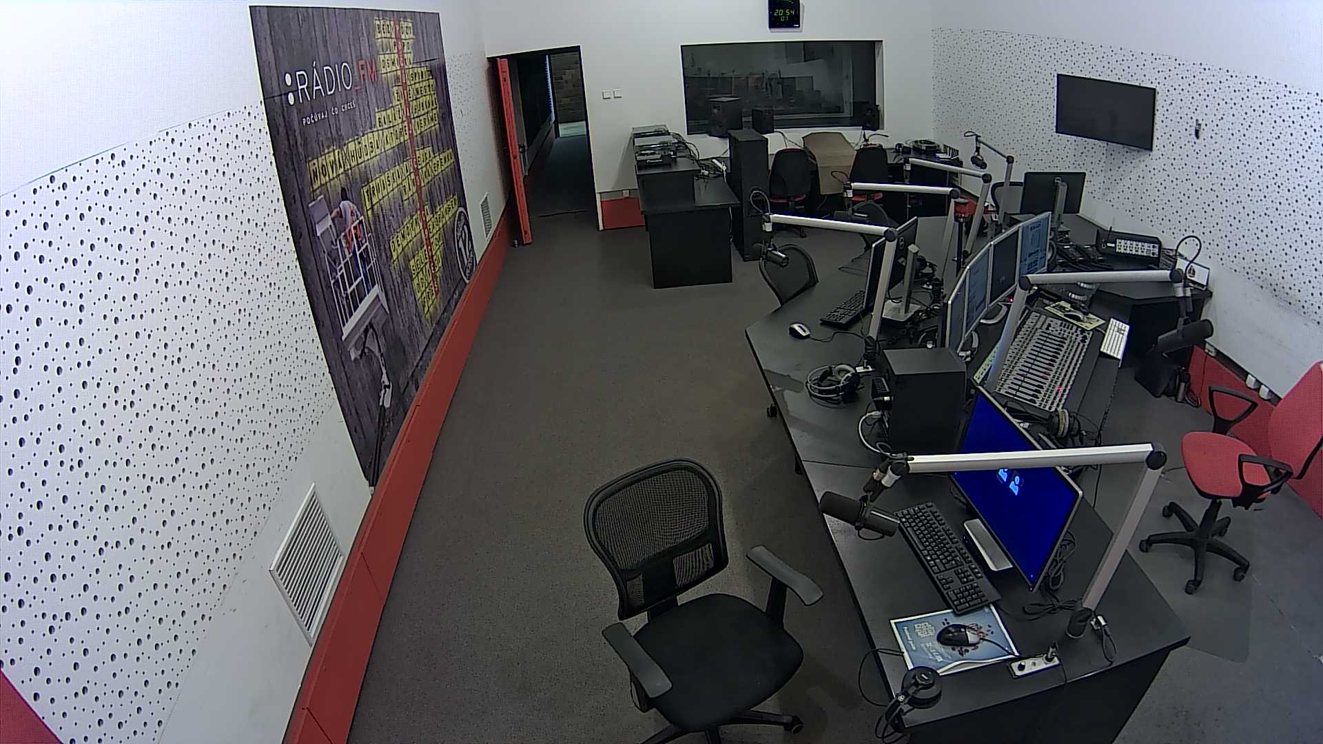 Pohľad do štúdia Rádia_FM sprostredkovaný webkamerou na internetových stránkach RTVS.